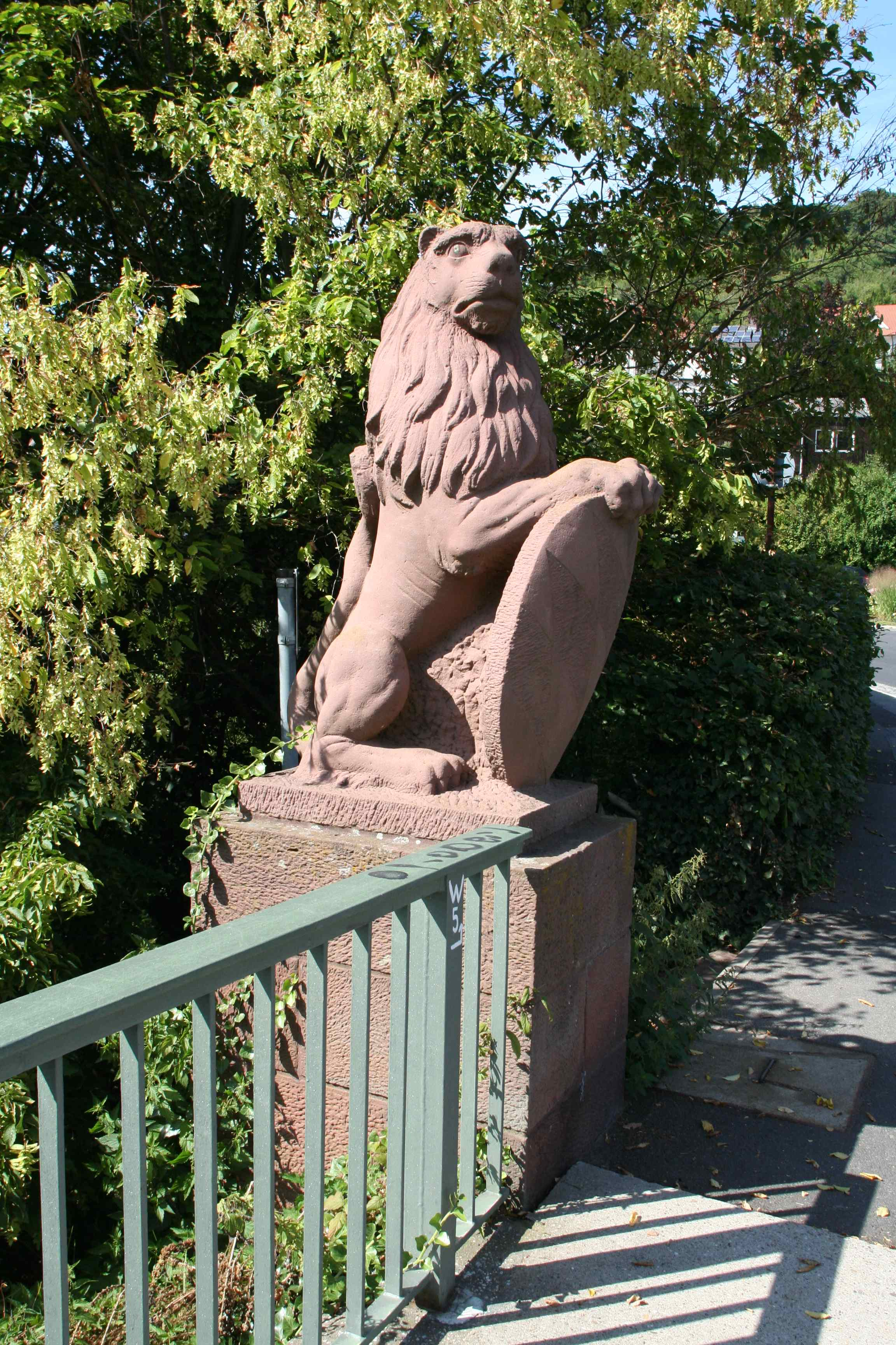 Mainbrücke Wertheim-Kreuzwertheim, Unterfranken